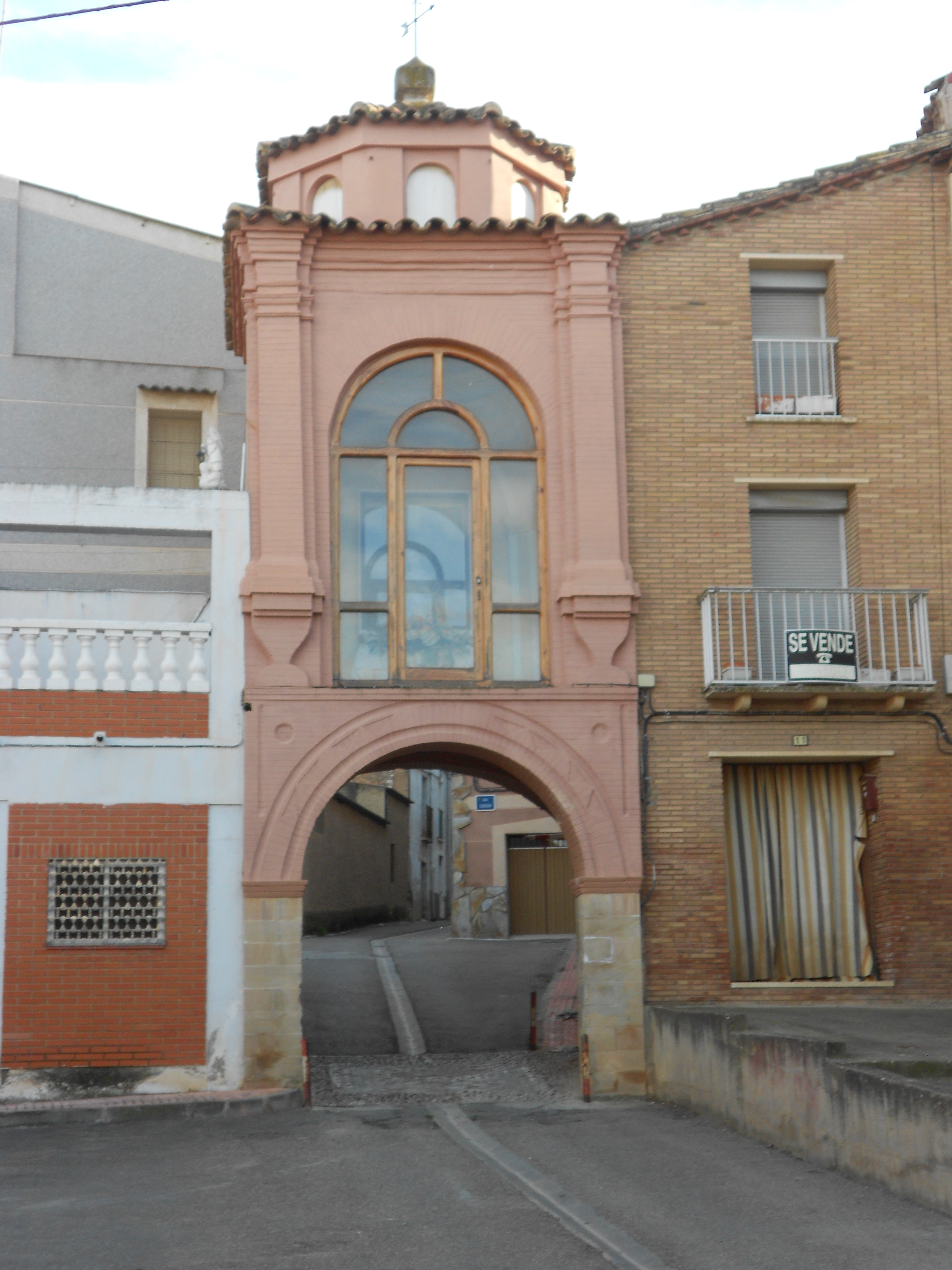 Portal de Santa Águeda (Escatrón, España)